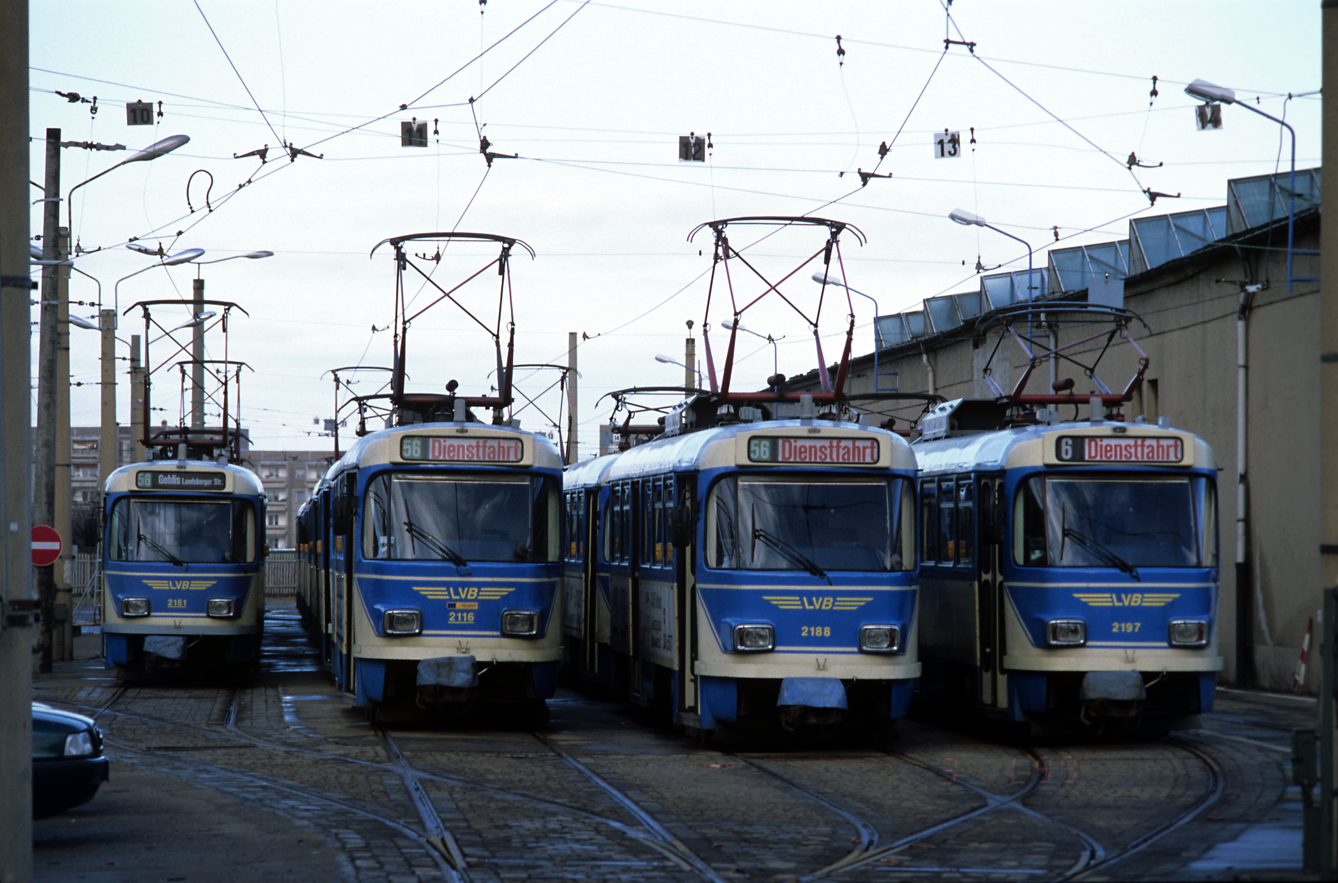 Triebwagen Typ 33c in der Freiabstellgruppe. Die unterstrichenen Wagennummern dienten in der Übergangszeit der Kennzeichnung der auf Choppersteuerung umgebauten Wagen. Die Liniennummern in der 50er Gruppe wurden für Schwachlast- und Nachtlinien benutzt.